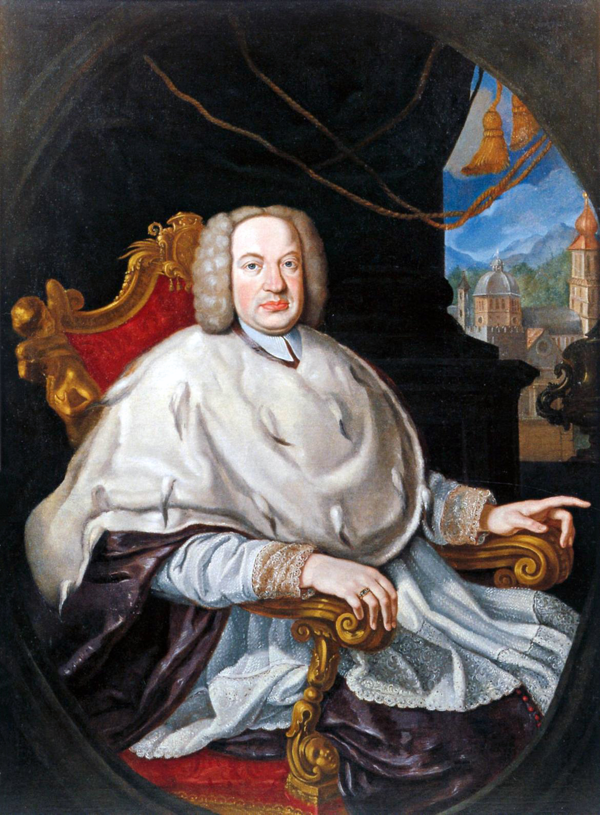 Ritratto di Domenico Antonio Thun